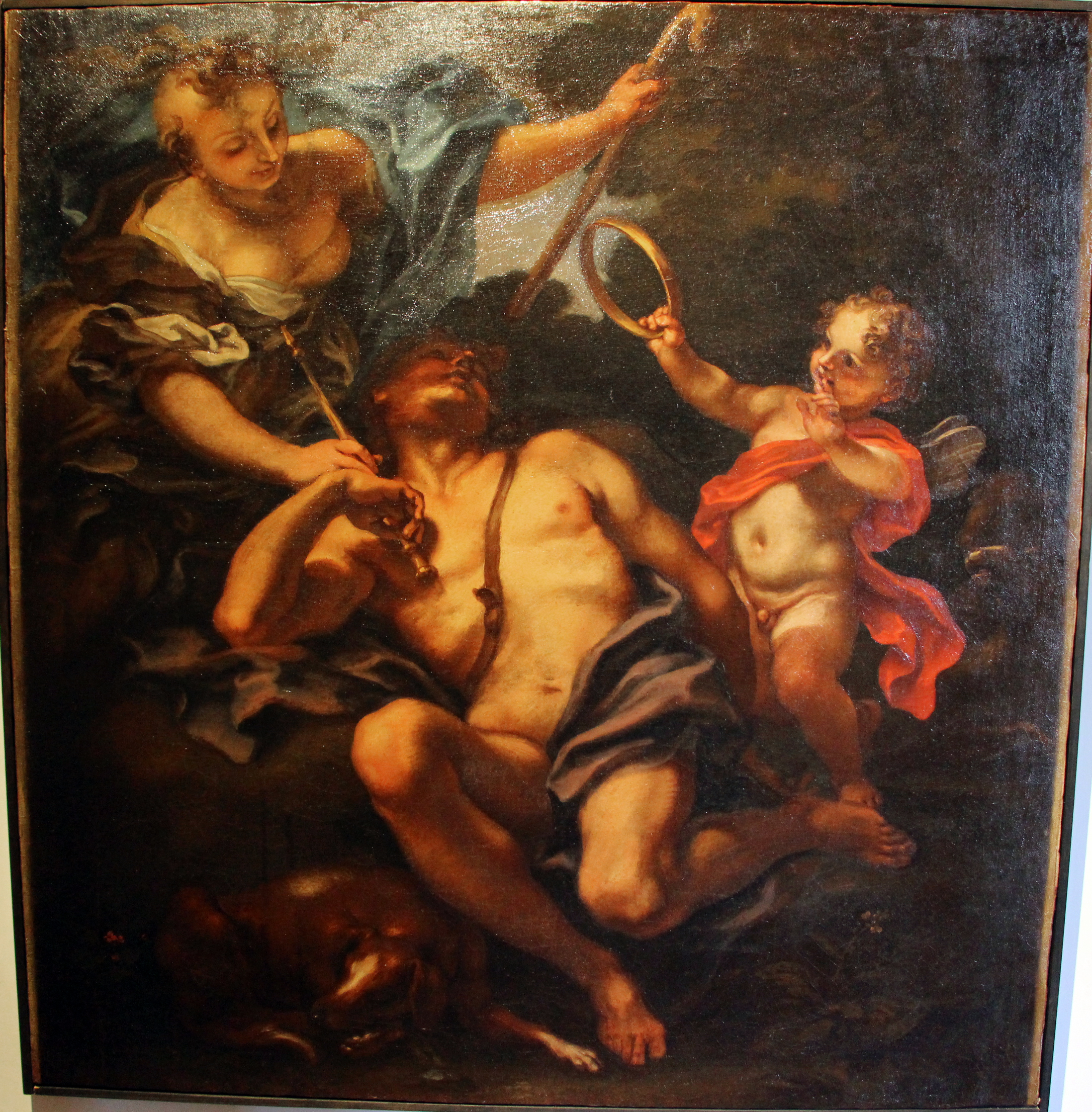 Palazzo Bianco o Palazzo Doria Brignole - Musei di Strada Nuova The making of this document was supported by Wikimedia CH. (Submit your project!) For all the files concerned, please see the category Supported by Wikimedia CH. This is a photo of a monument which is part of cultural heritage of Italy.